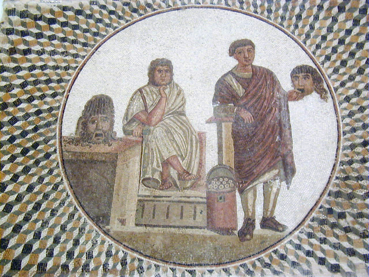 mosaïque masques théâtre musee sousse